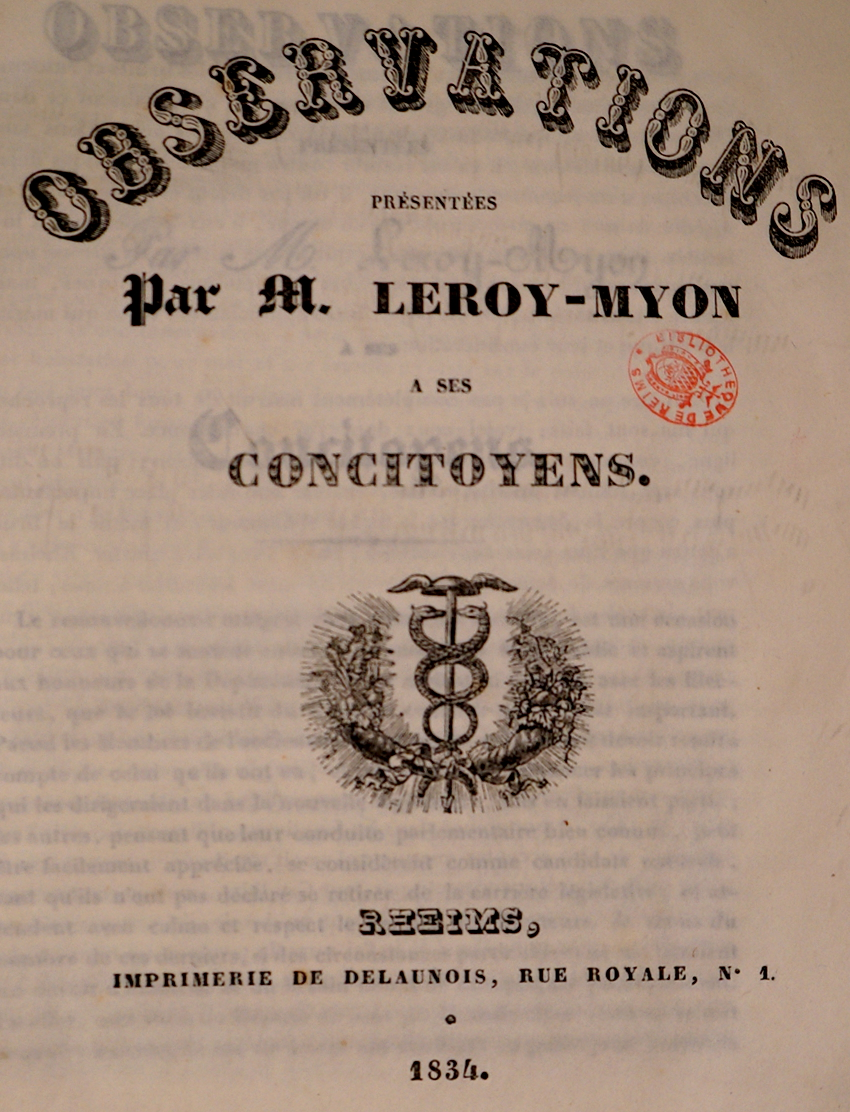 issu du fond de la bibliothèque municipale de Reims.